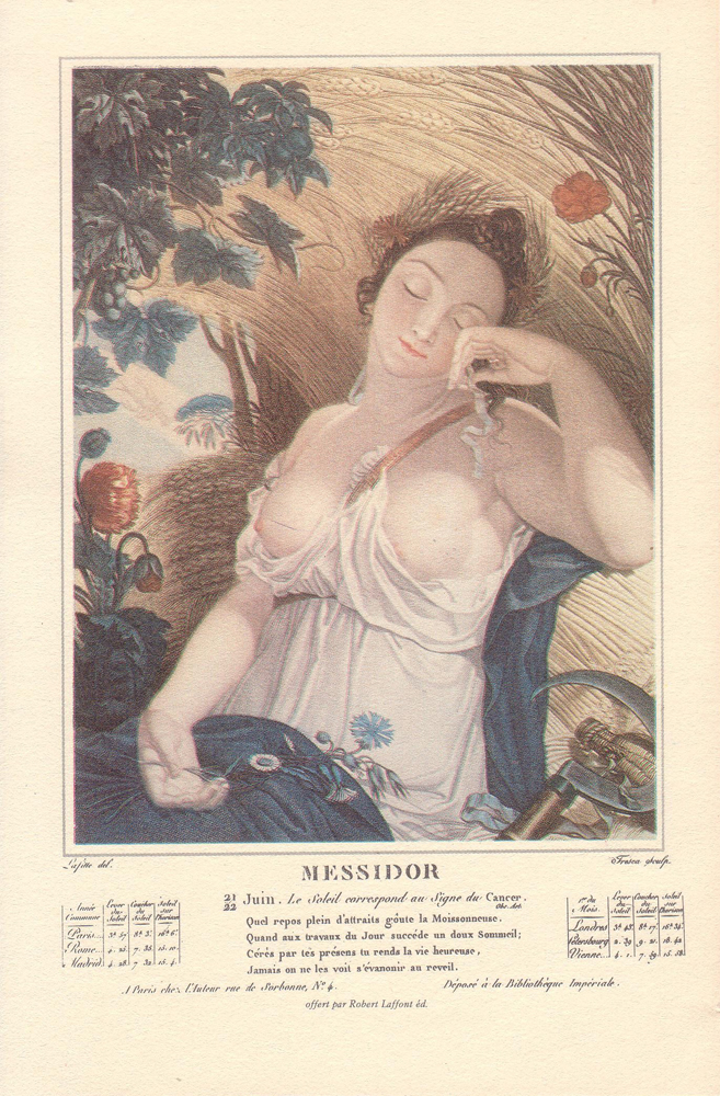 French Revolutionary Calendar MESSIDOR 21-22 Juin: Le Soleil correspond au Signe du Cancer Quel repos plein d'attraits goûte la Moissonneuse Quand aux travaux du Jour succèce un doux Sommeil Cérès par tes présens tu rends la vie heureuse Jamais on ne les voit s'évanouir au réveil